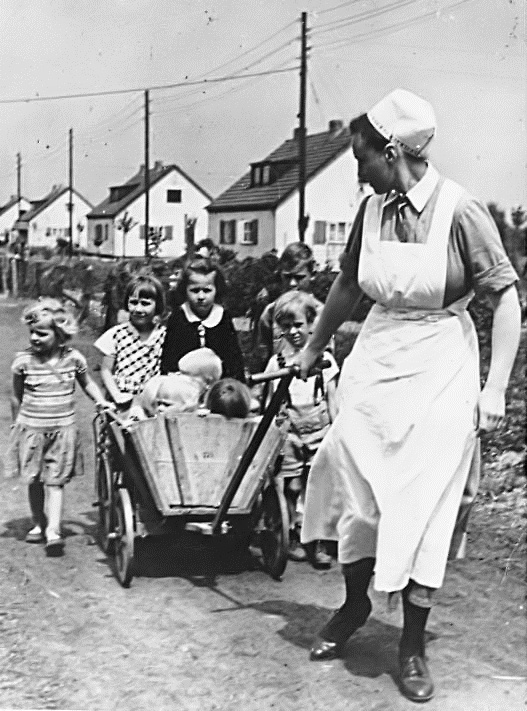 N.S.V. sorgt für Kinder arbeitender Mütter. Die Kleinsten der Kindertagesstätte werden von einer N.S.V. Schwester ins Freie spazieren gefahren. E.M. Obis 1 1943